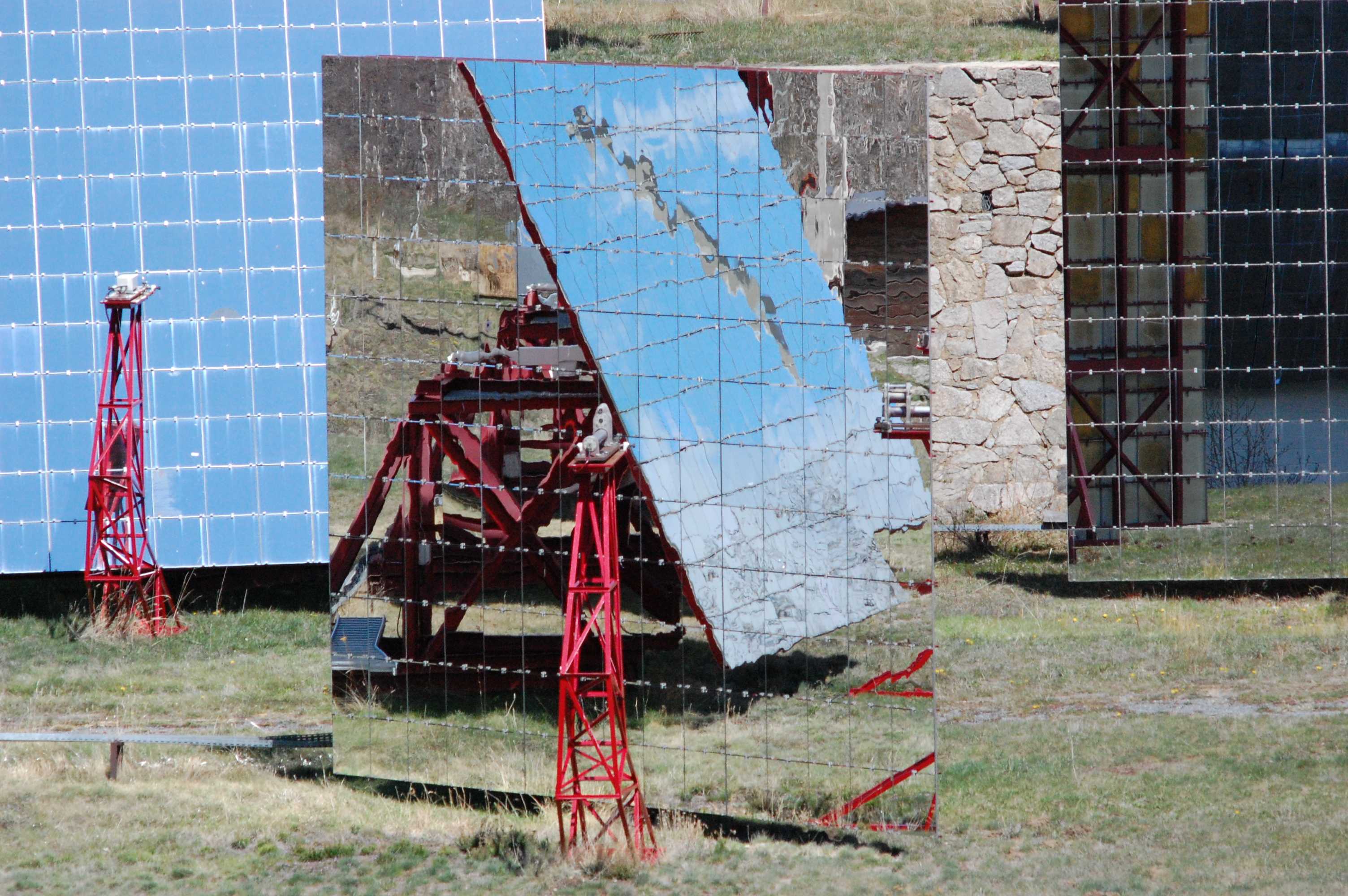 Heliostat du four solaire d'odeillo. (Font-Romeu, Pyrénées Orientales)